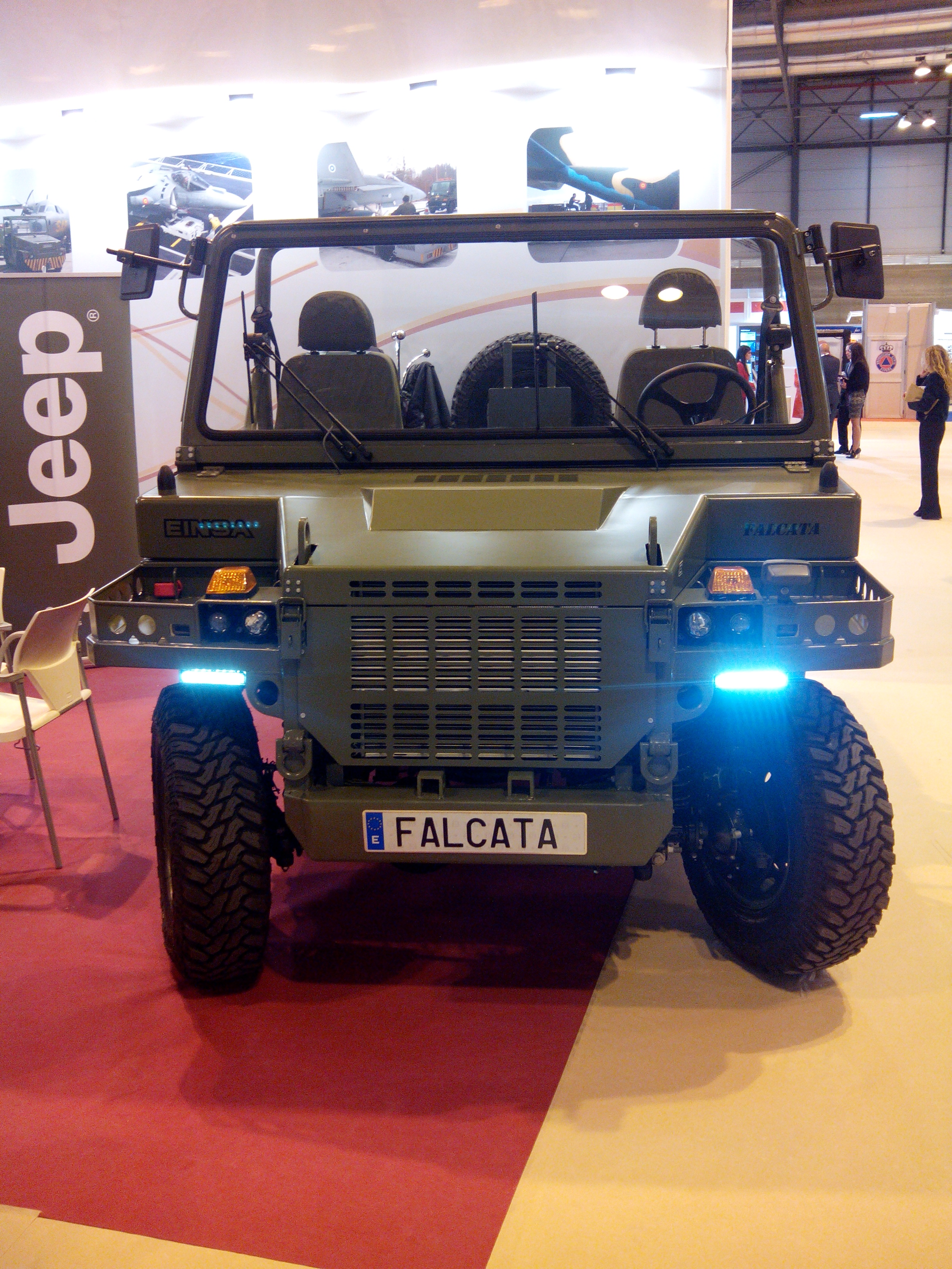 Mula Mecánica de última generación MM-1A Mk-2, más conocida por Falcata, nombre con el que era designada la espada íbera de la Edad Antigua. Este vehículo está producido por EINSA. Su velocidad ha de ser, al menos, de 50 km/h, una autonomía de 500 km, pudiendo portar una carga de 650 kg. o hasta seis personas, dos en el módulo tractor y cuatro en la plataforma de carga. Además deberá poder operar en condiciones todo terreno y condiciones extremas como barro, arena o nieve y disponer de un afuste que permita la instalación de diferentes armas como una ametralladora pesada, un lanzagranadas automático de 40 mm, misiles anticarro Spike y un lanzador de misiles antiaéreos Mistral.